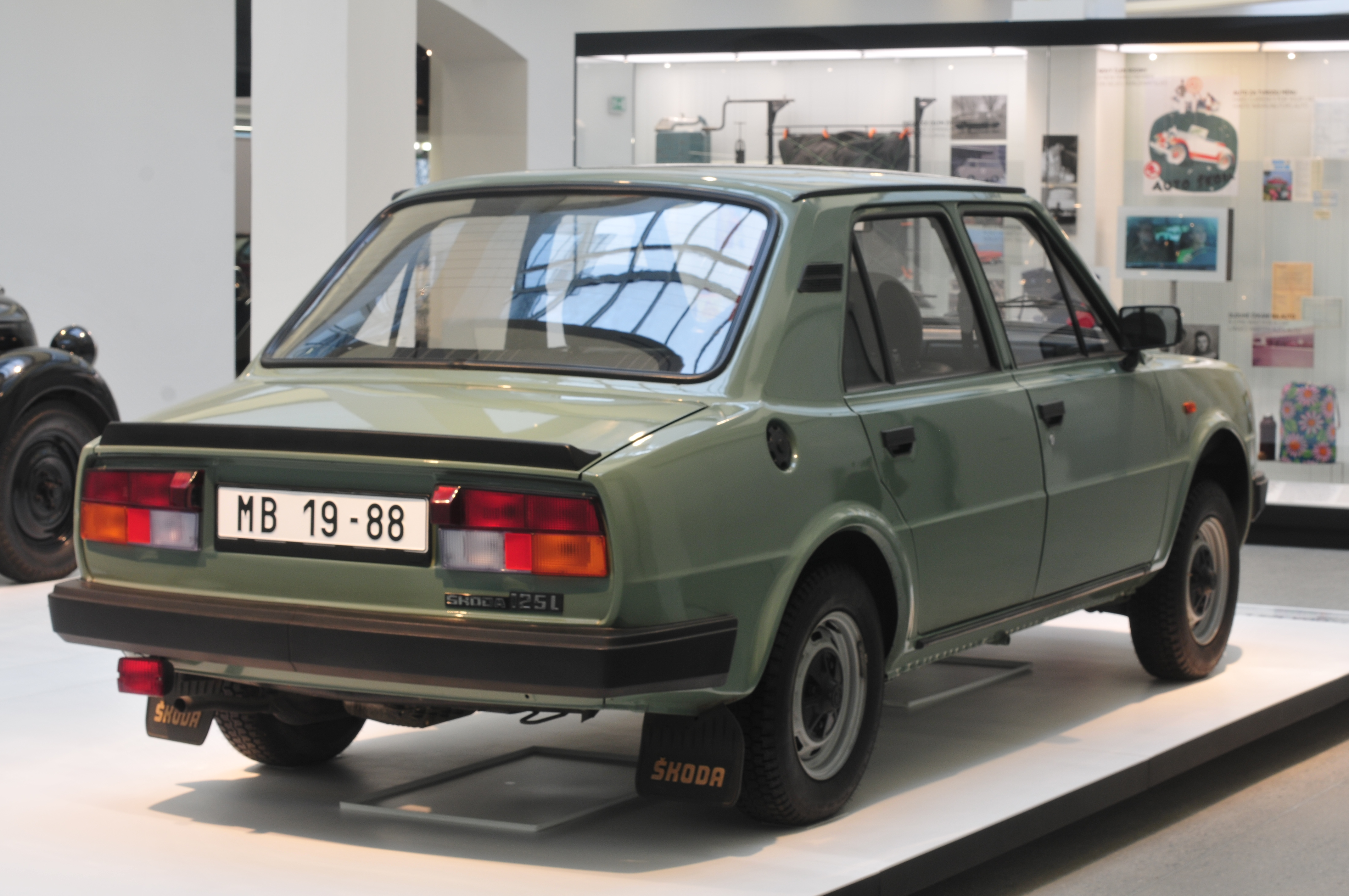 Fototermin Škoda Museum Mladá Boleslav 2013, Skoda 125L Fototermin Škoda Muzeum 5. April 2013 in Mladá Boleslav This work is free and may be used by anyone for any purpose. If you wish to use this content, you do not need to request permission as long as you follow any licensing requirements mentioned on this page.